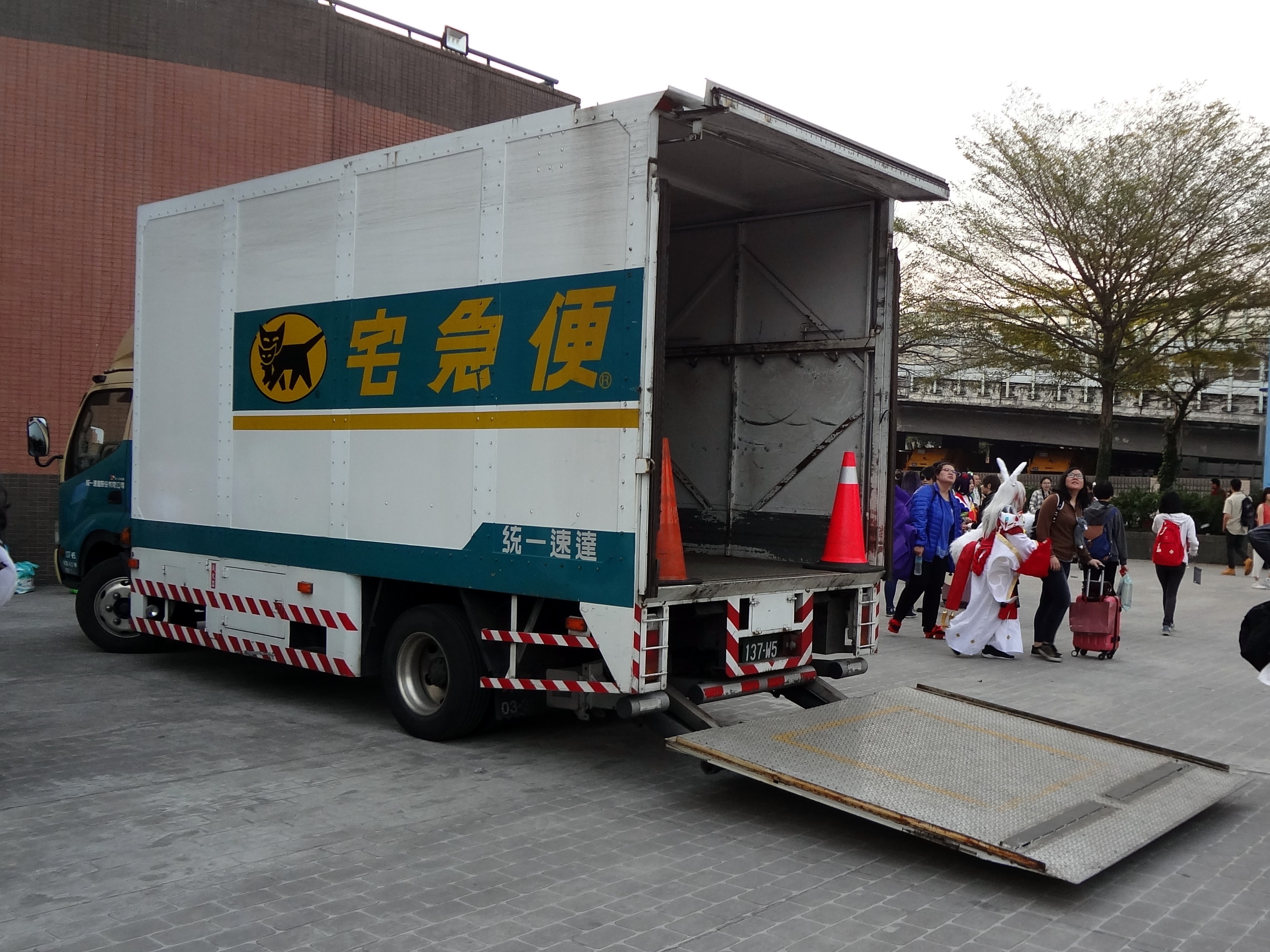 第48屆台灣同人誌販售會，國立臺灣大學綜合體育館外，統一速達日野300物流車137-W5卸貨中。